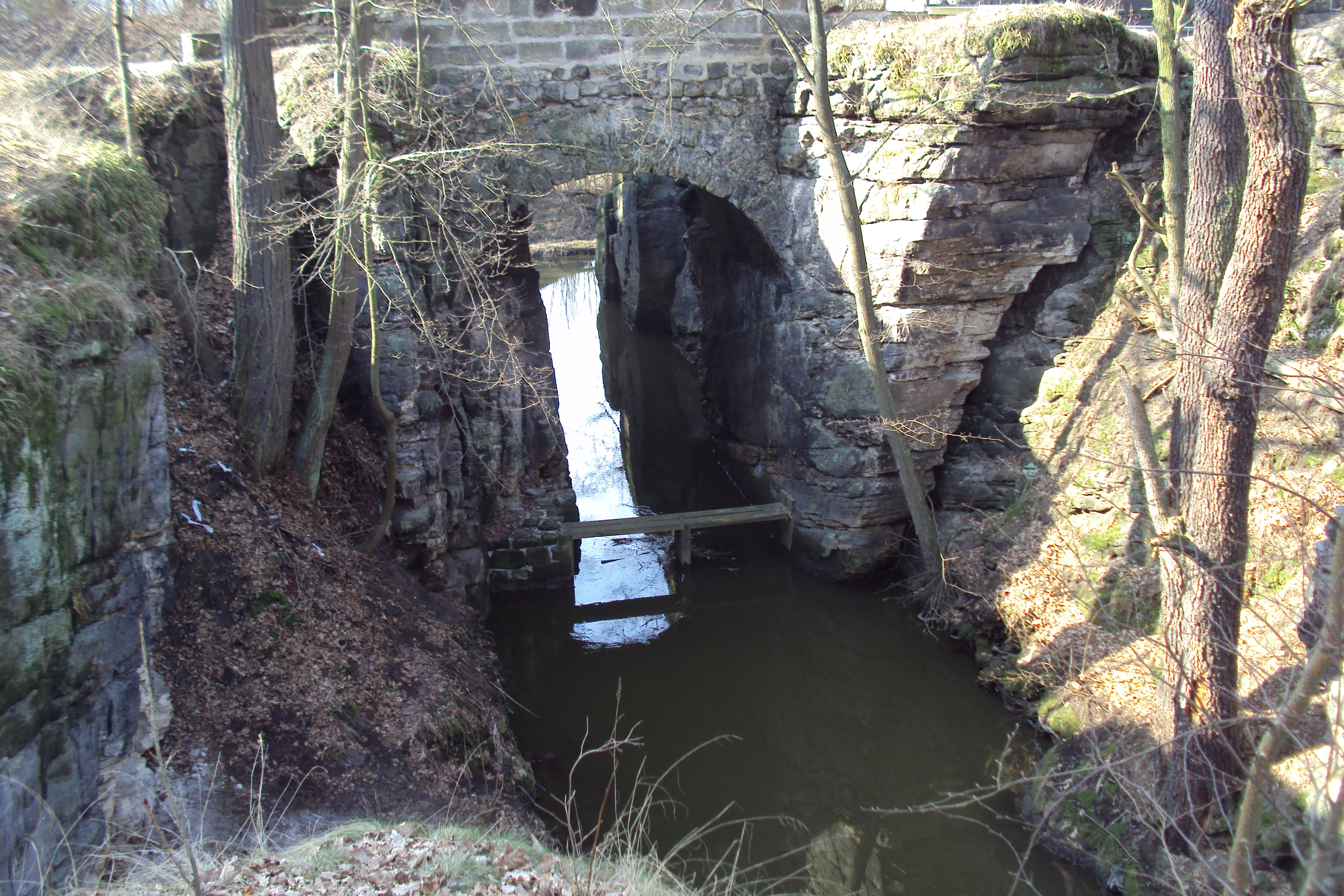 Umělý kanál, jedno z napájení Novohradského rybníka z Bobřího potoka, katastr Zahrádky na Českolipsku